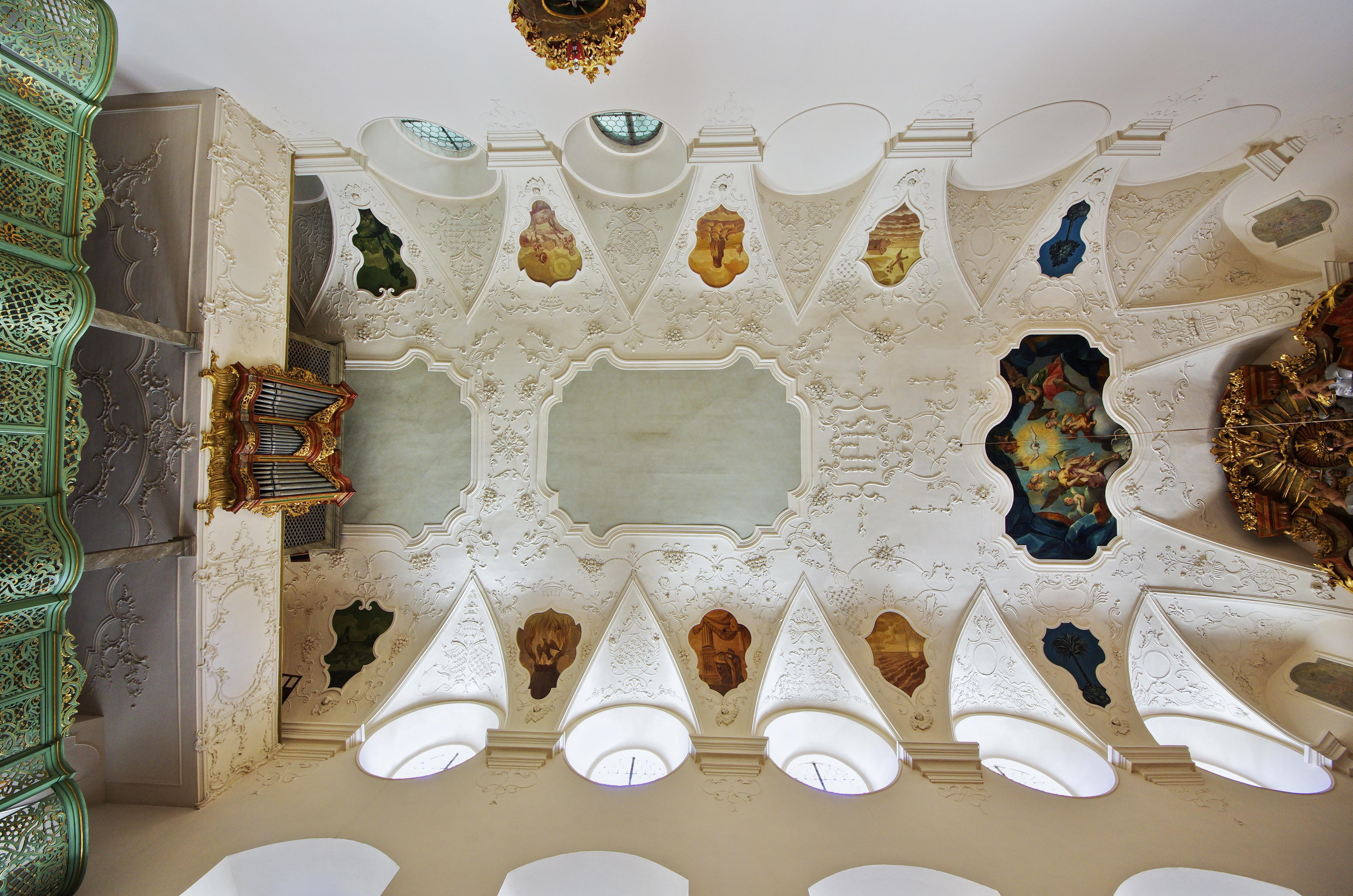 Die gesamte Decke der Kirche, links die Empore und die Orgel, rechts das Oberteil des Altars Bilder aus dem Innenraum der Ursulakirche